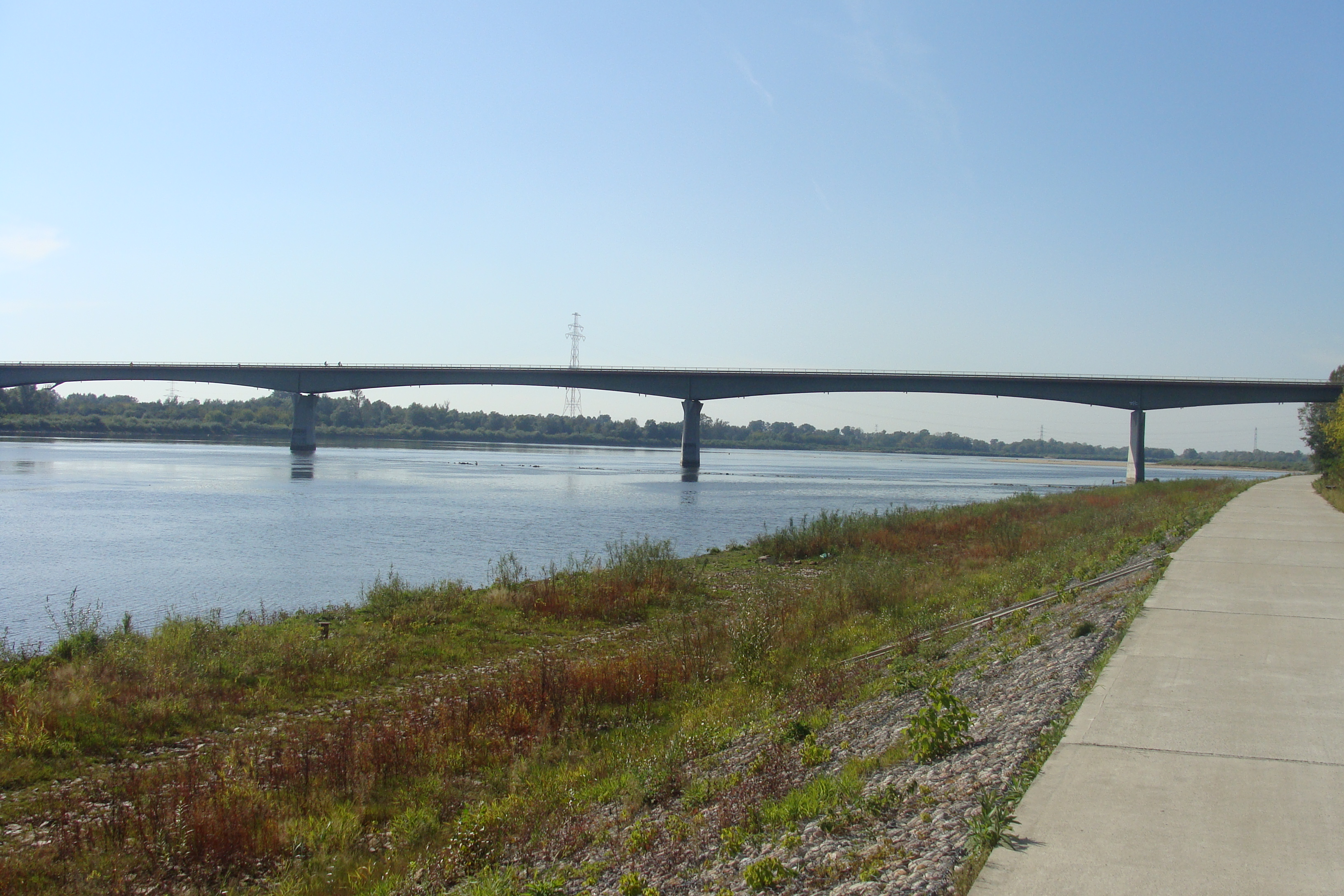 Nowy most w Wyszogrodzie – wskutek ciągłego uszkadzania starego, drewnianego mostu na Wiśle przez kry czy wezbrane wody rzeki, podjęto decyzję o budowie nowej przeprawy mostowej. Pomysł wybudowania nowego mostu poparty był również tym iż drewniany most miał ograniczoną nośność, ciężkie samochody ciężarowe nie mogły po nim przejechać. W 1999 r. most został oddany do użytku, a stary został prawie całkowicie rozebrany.